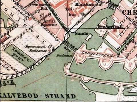 Udsnit af Image:Karte Kopenhagen MKL1888.jpg, der bl.a. viser Islands Brygge før opfyldningerne.